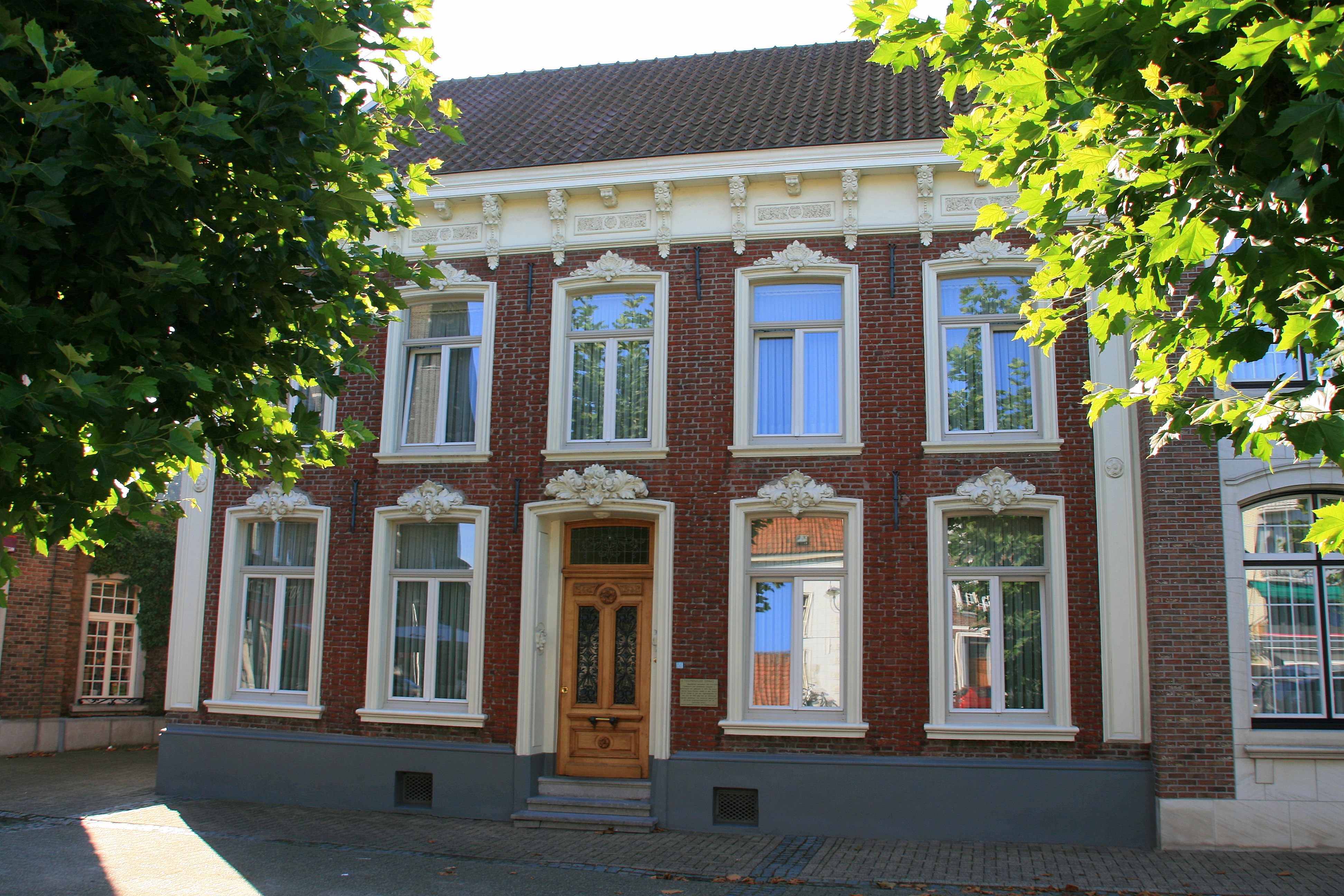 Teutenhuis met opvallende lijstgevel in eclectische stijl gebouwd in 1875. De teutenfamilie Spaas-Neyens baatte er een slijterij uit en richtte er ook een sigarenfabriek op. Van 1910 tot 1970 was hier de wijnhandel Joosten gevestigd. Het woonhuis getuigt van de grote ondernemingskracht van de Hamontse teuten. Heden bewoond door Fr. van Engelen-Verbeek.